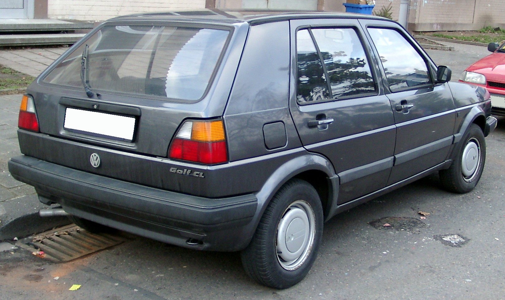 VW Golf II